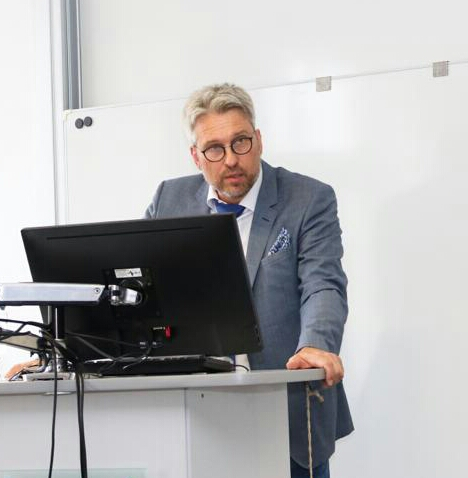 Person Uli Sann